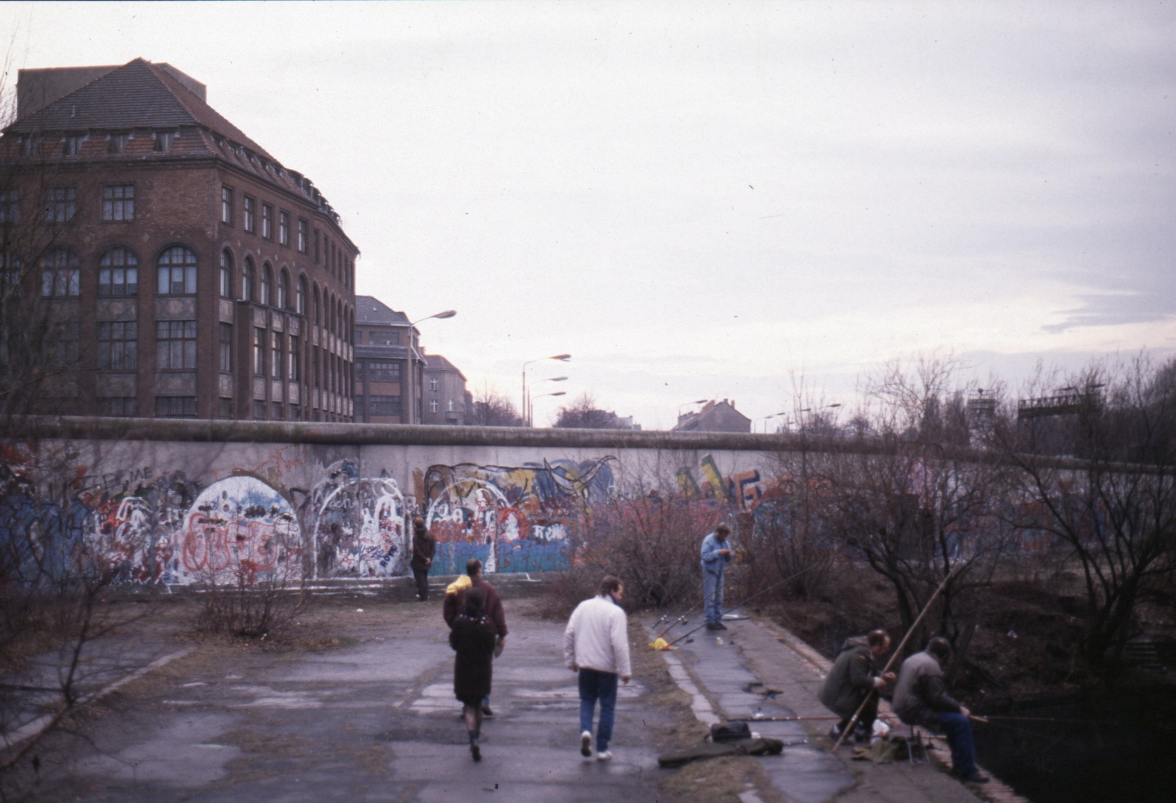 Treptower Brücke Berlin-Kreuzberg